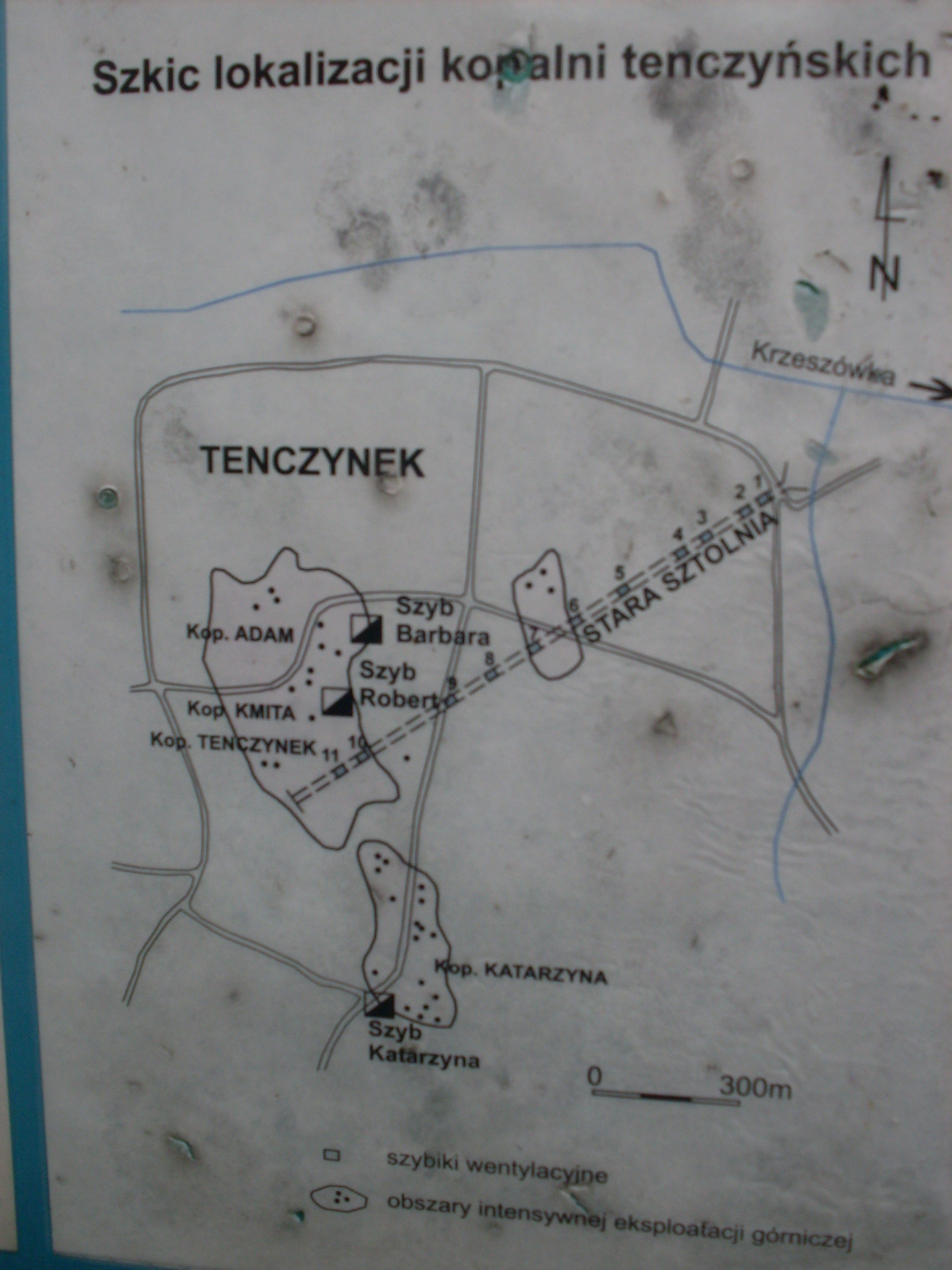 Sieć lokalizacji kopalni tenczyńskich-tablica w Tenczynku